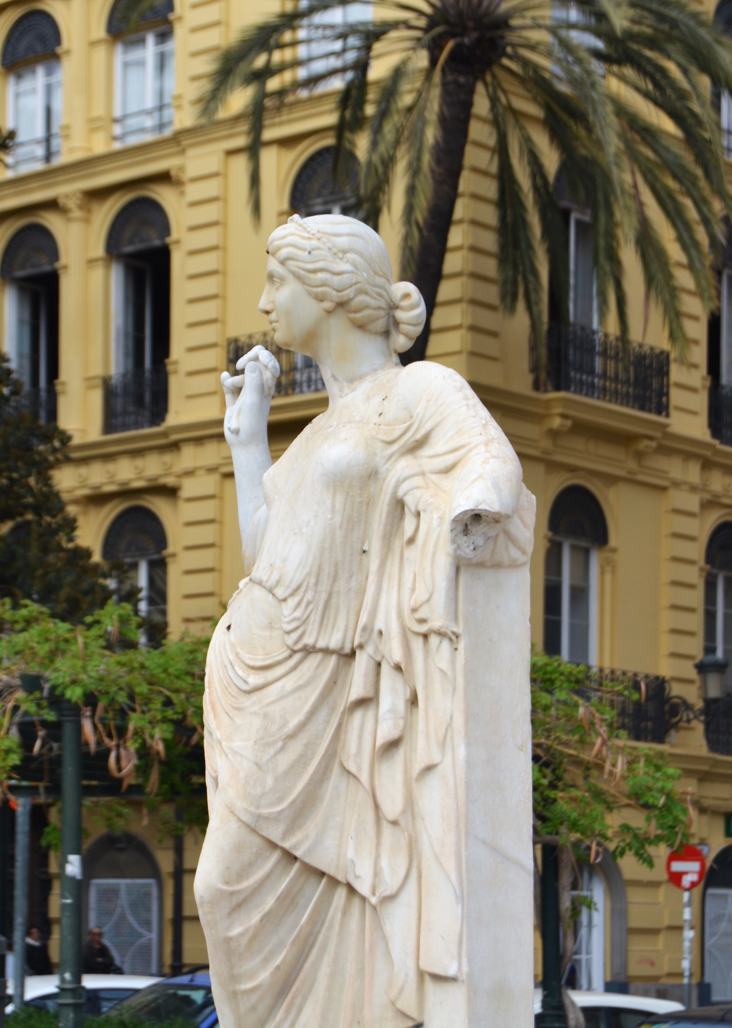 Font de la deessa Flora estàtua, Albereda de València.